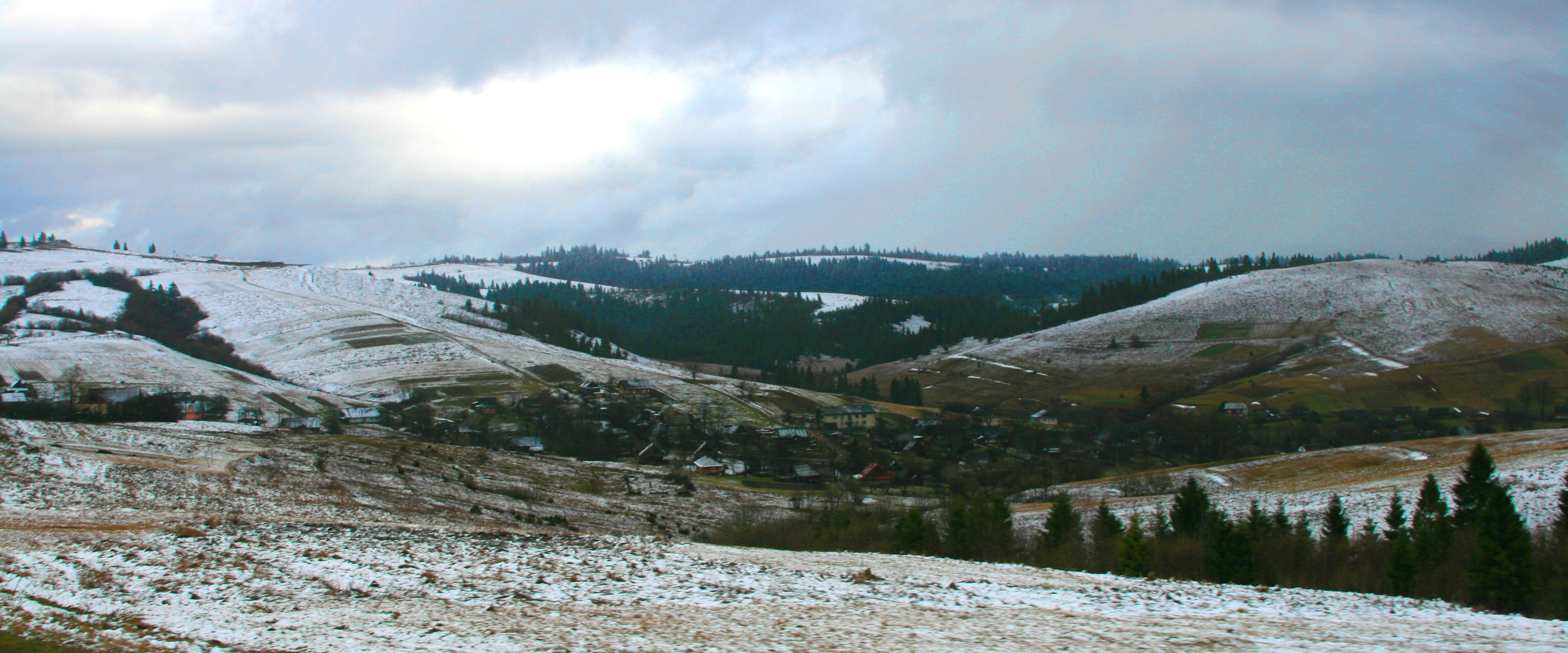 Вид на село Борыня во Львовской области.